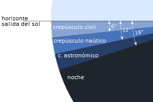 Distintas fases del crepúsculo matutino